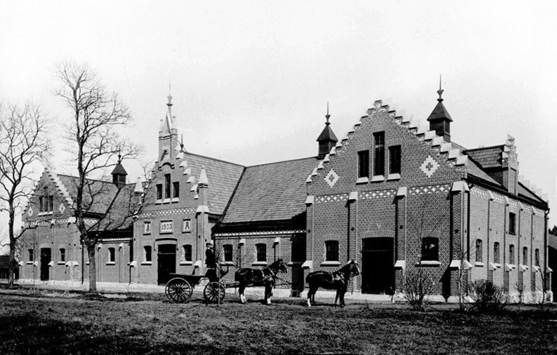 Taxinge-Näsby slotts stora stall